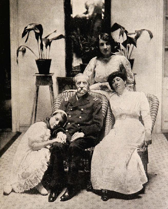 El General Adolfo Holley, su hija y nietos.